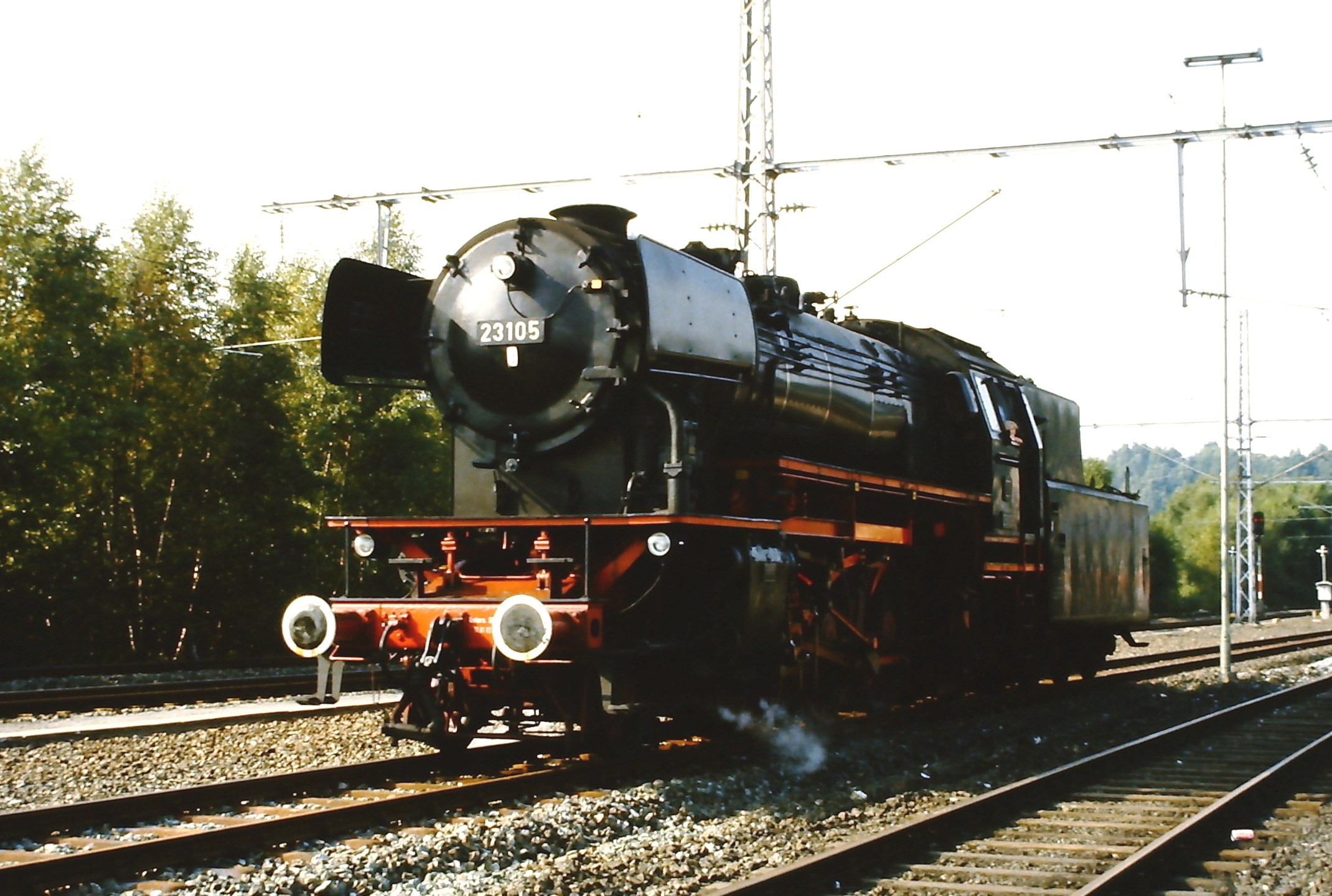 Dampflokomotive 23 105, ausgestellt auf der Fahrzeugschau 150 Jahre deutsche Eisenbahn in Bochum-Dahlhausen.